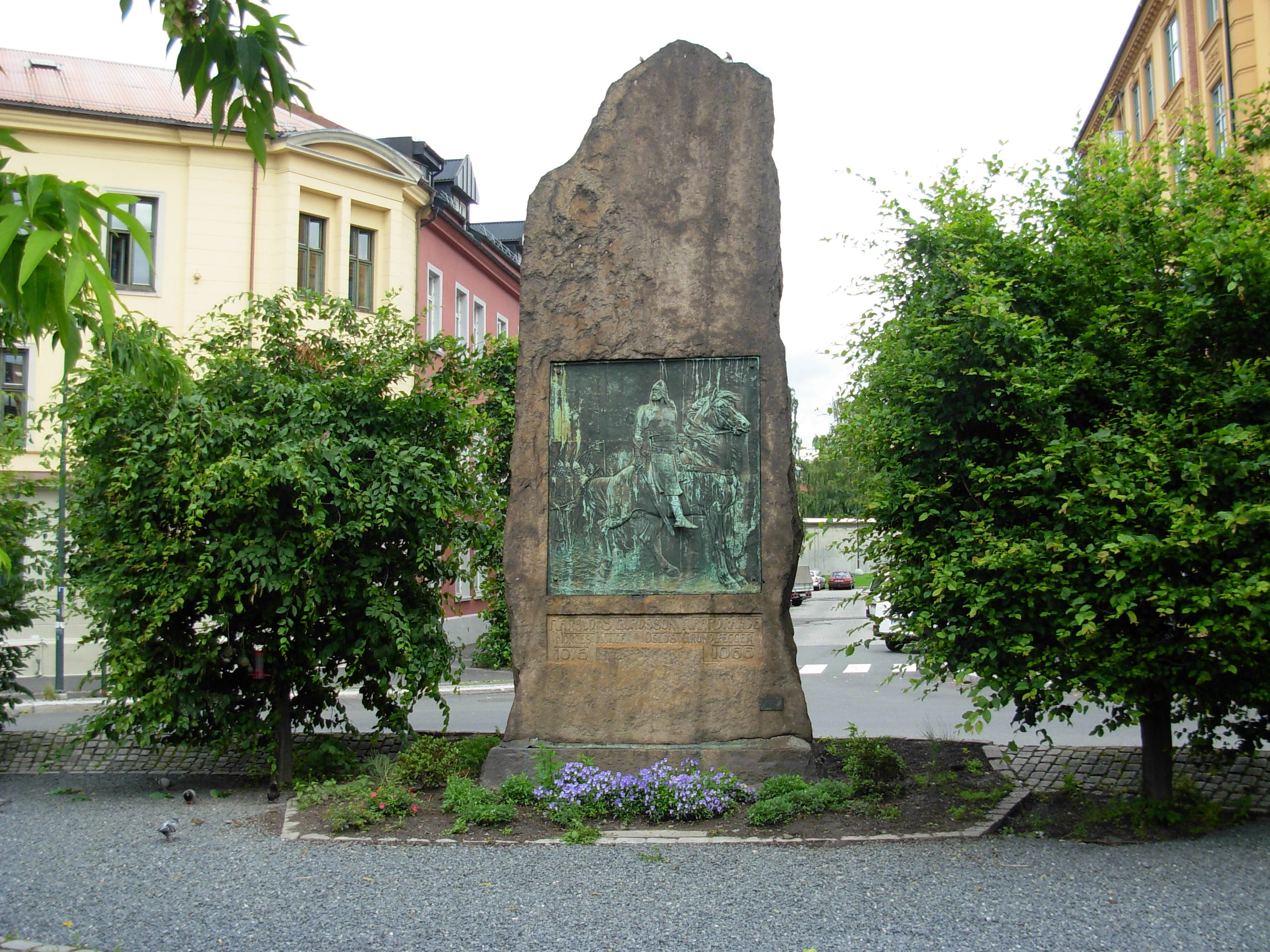 Bautaen på Harald Hardrådes plass, Gamlebyen, Oslo